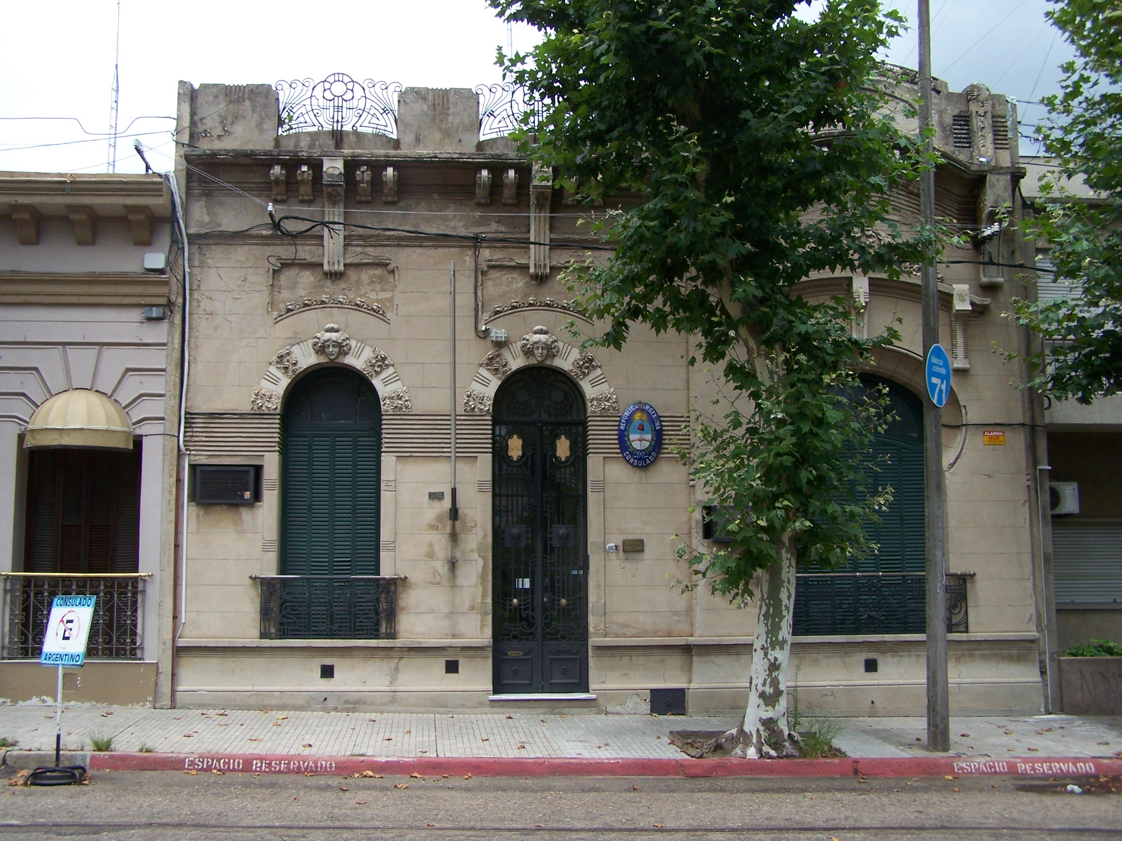 Wahrscheinlich das einzige Konsulat in Salto... Das Argentinische Konsulat an der Plaza Artigas